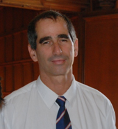 אפרים לב